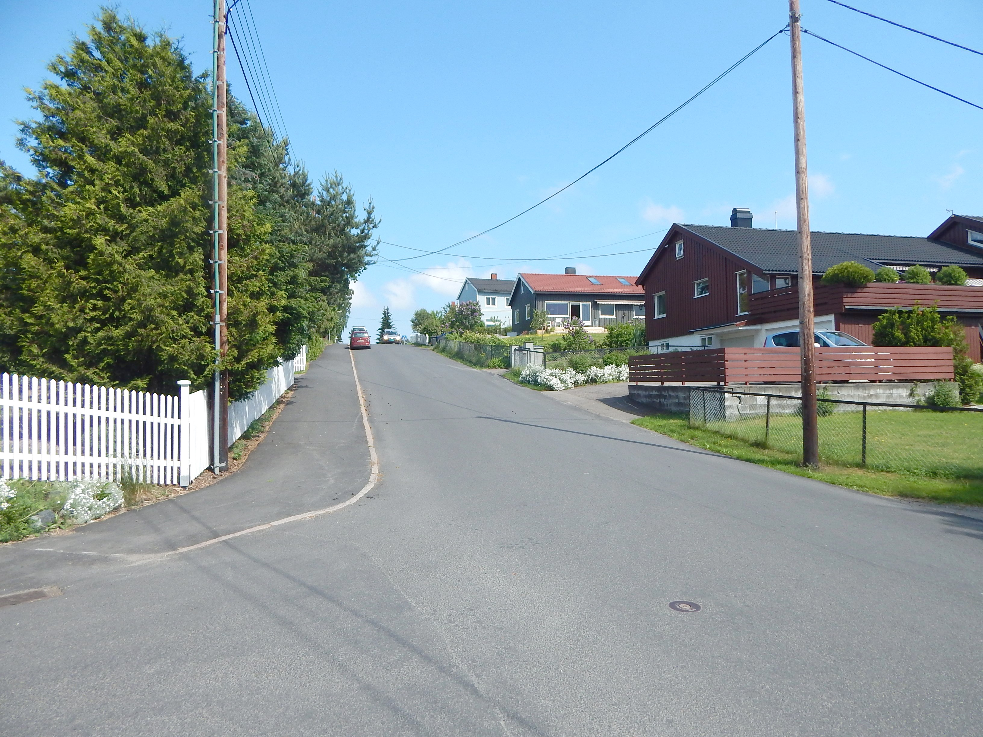 Manglerudveien